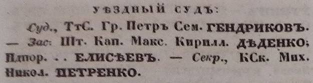 Михайло Петренко, про Вовчанський повітовий суд з адрес-календарю